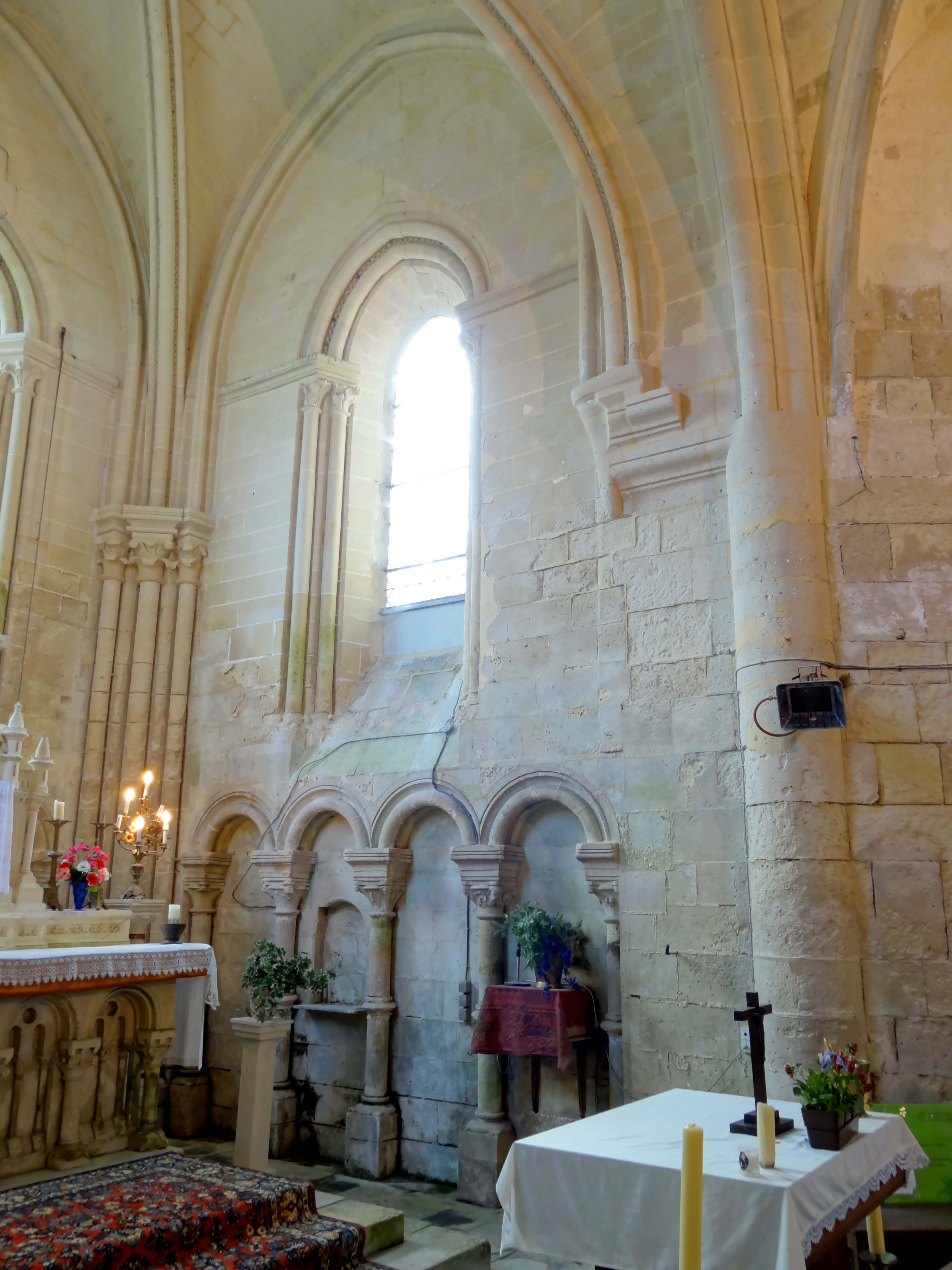 Intérieur de l'église - voir titre.